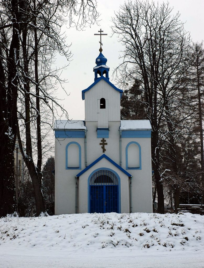 Chrám Narození přesvaté Bohorodice, Ostrava-Michálkovice